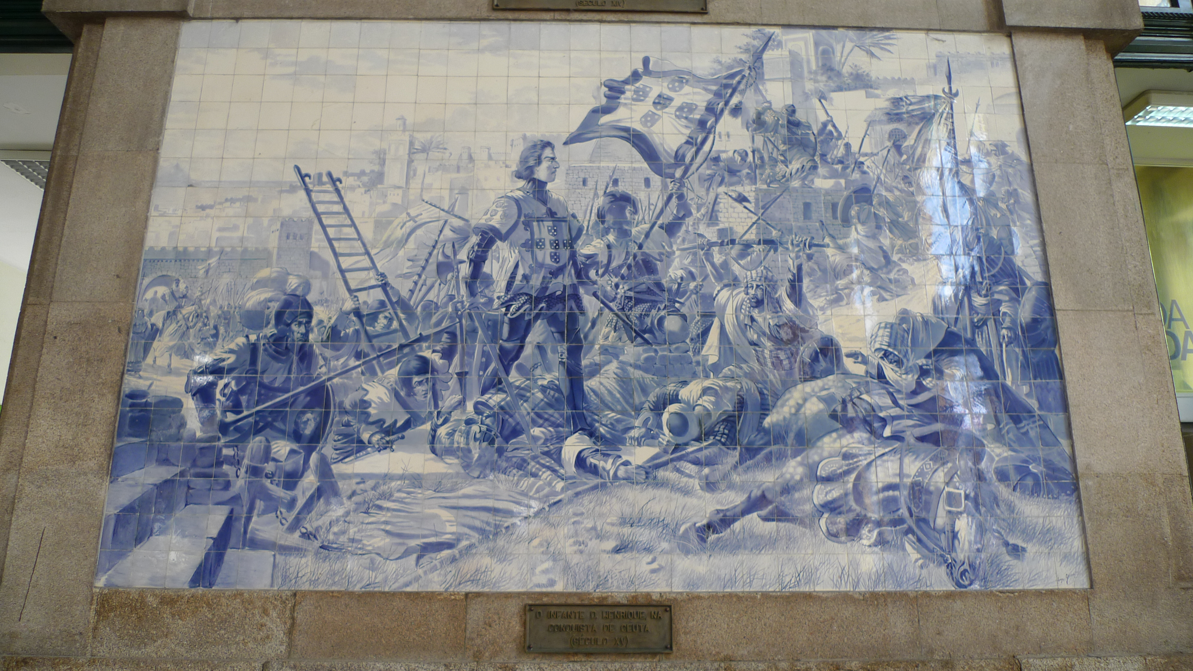 L1180464